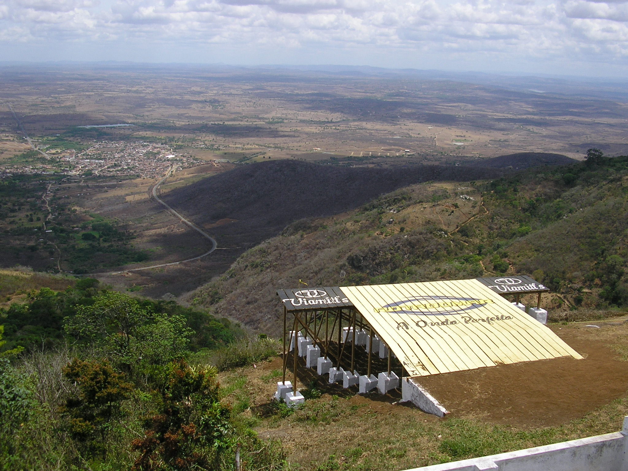 Vista da Rampa do Pepê , Taquaritinga do Norte - PE